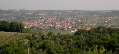 Ratkoviči sa brda